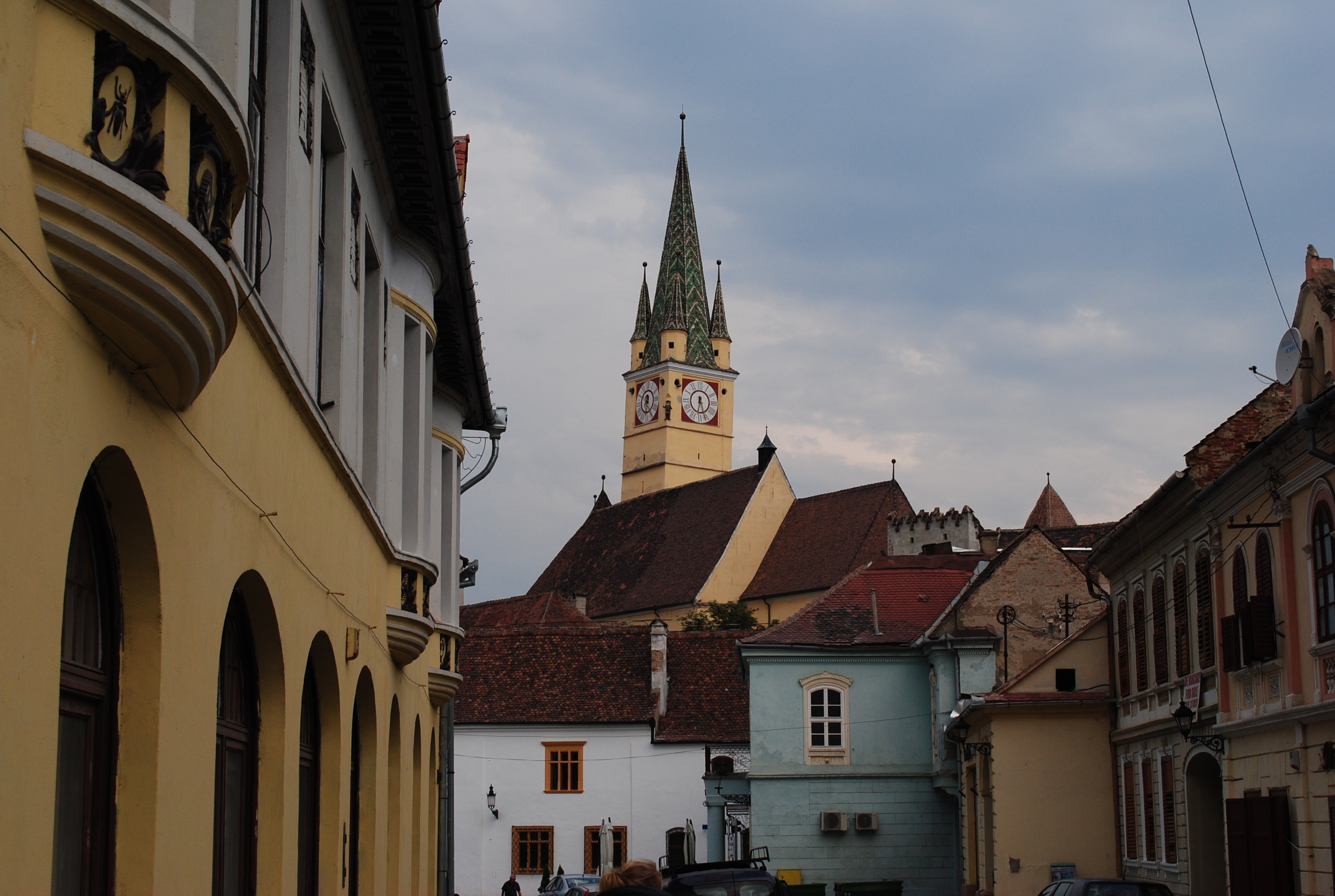 Ansamblul urban "Centrul istoric al municipiului"